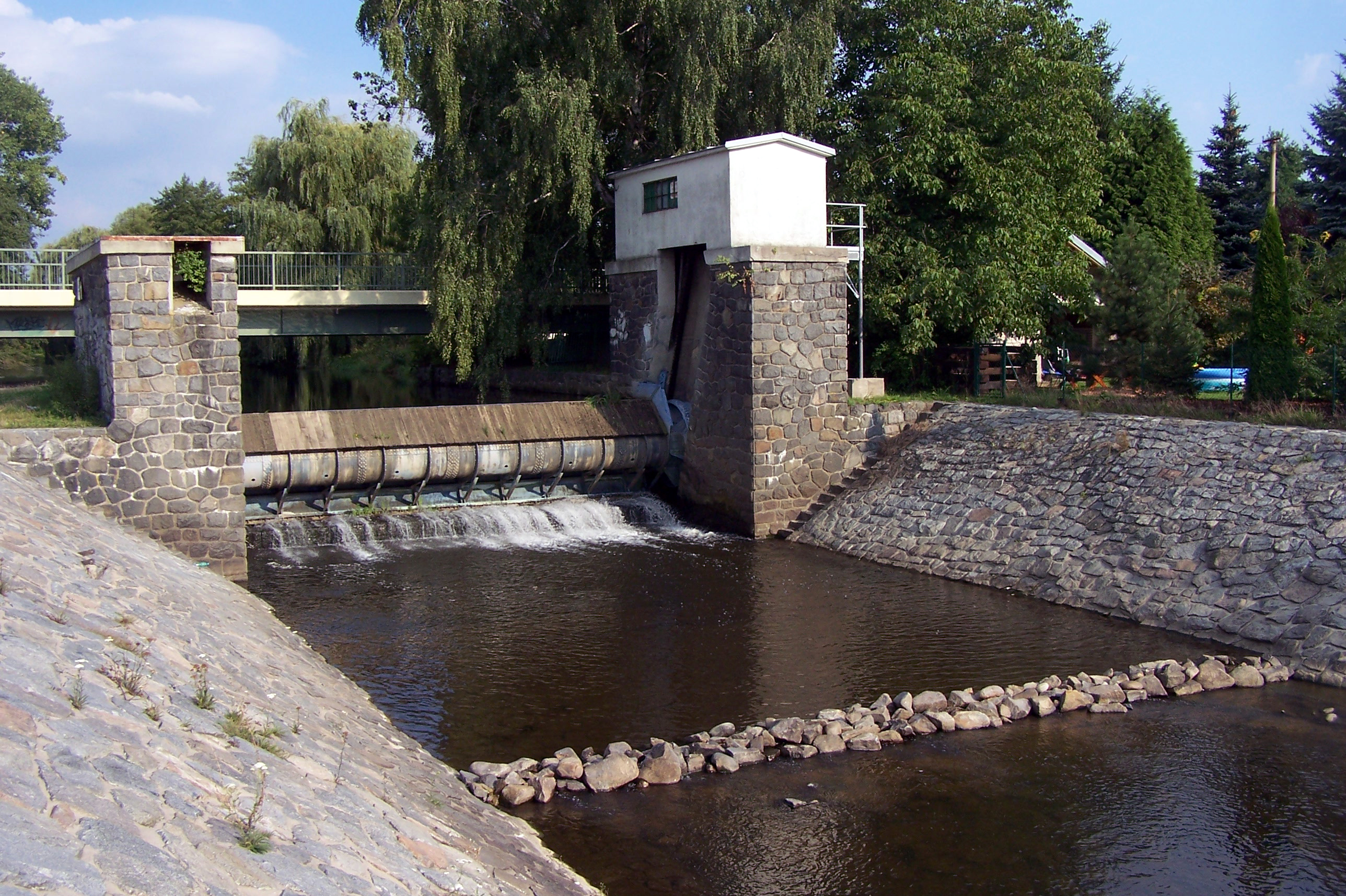 Nemošice, jez na Chrudimce. GPS: 50°0'54.141"N, 15°47'43.847"E